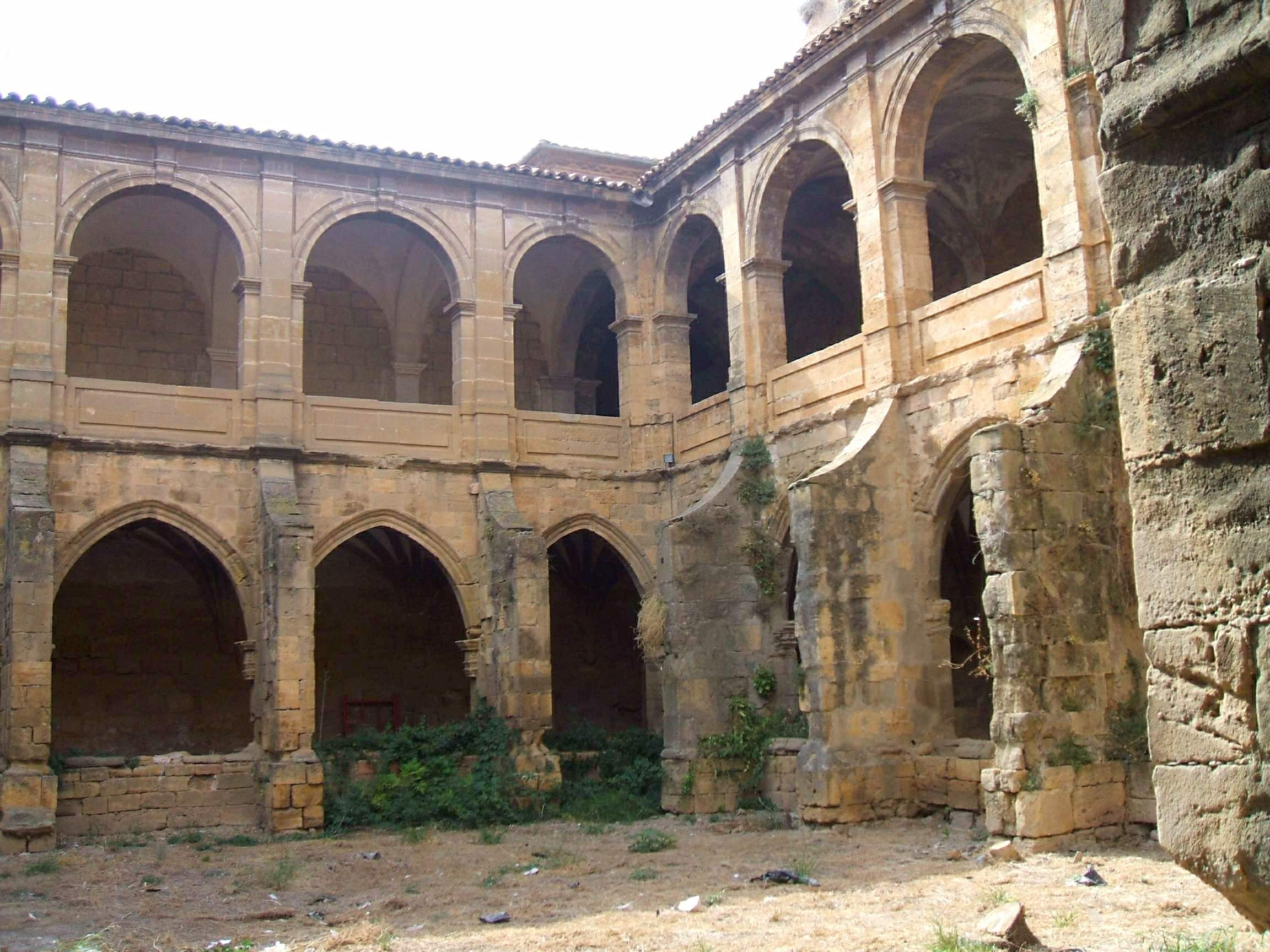 Claustro del Monasterio de Santa María la Real, Fitero (Navarra)